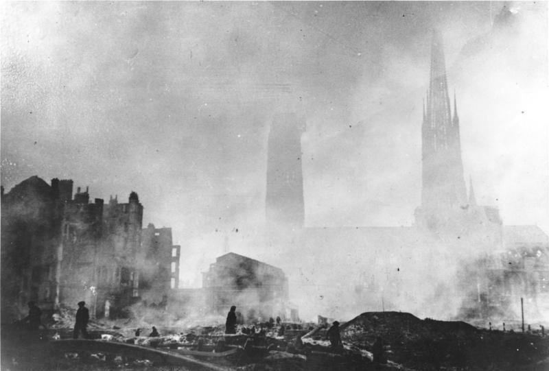 Die Kathedrale von Rouen zerstört. Die Kathedrale von Rouen nach dem letzten schweren anglo-amerikanischen Bombenangriff auf die Stadt. Dieses weltberühmte Bauwerk wurde durch Feuer vollständig zerstört, nachdem es schon früher durch Bombentreffer beschädigt worden war. 13. Juni 1944